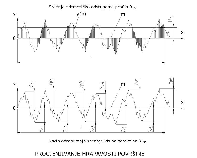 Procjenjivanje hrapavosti površine